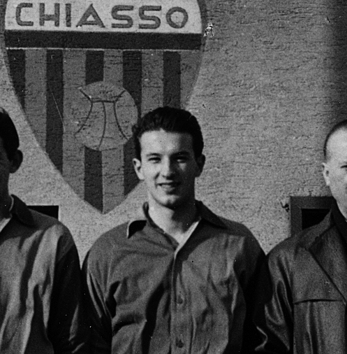 Francesco Chiesa. Ha giocato nel Chiasso e nella nazionale svizzera di calcio.